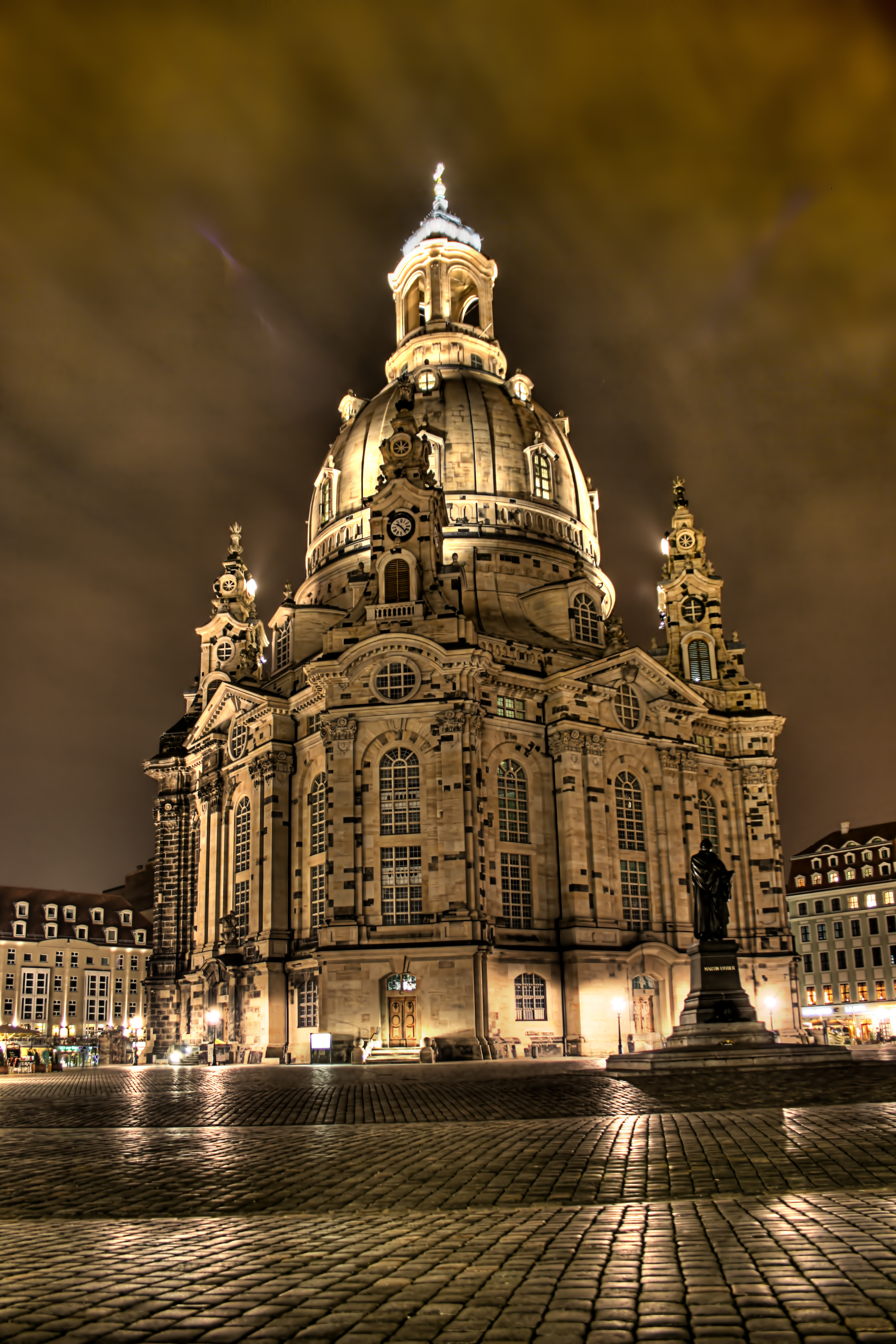 Die Dresdner Frauenkirche, wie sie bei einem nächtlichen Spaziergang durch die innere Altstadt zu bewundern ist.